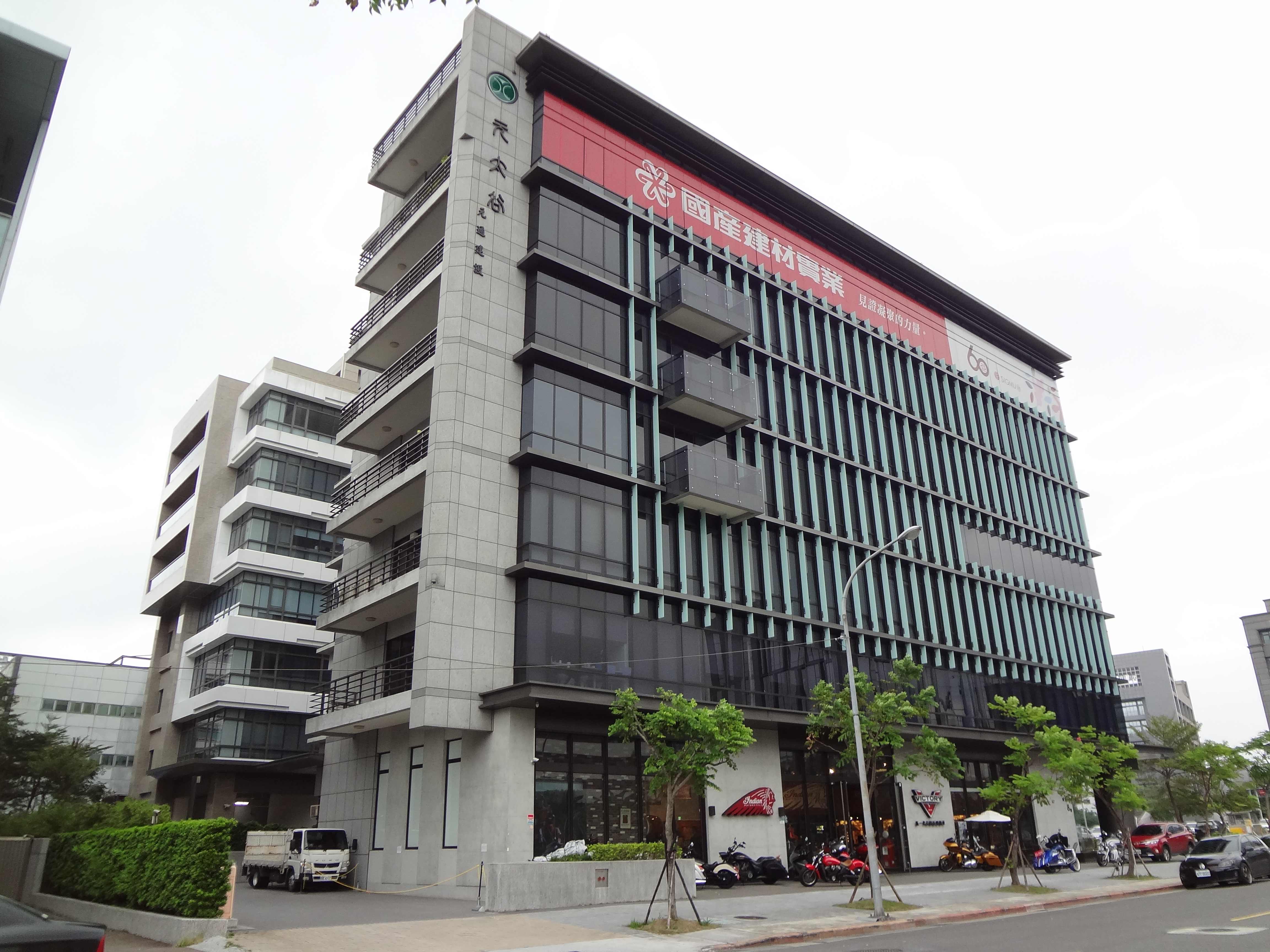 元通建設「元太谷商業大樓」，位於臺北市內湖區新湖一路8號。國產建材實業總部位於7樓。